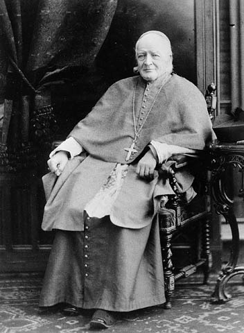 Mgr. Ignace Bourget - Archbishop